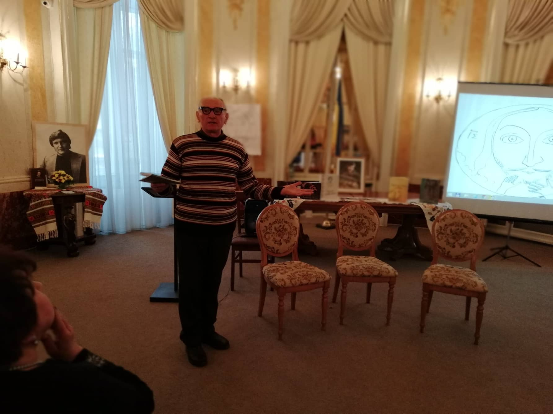 Юрій Павельчук – митець, вітражист з Луцька, який працював більше 10 років над графічно роботою Т. Шевченка “Лик Христа” (1858 р.) – художньо – графічним заповітом Шевченка.